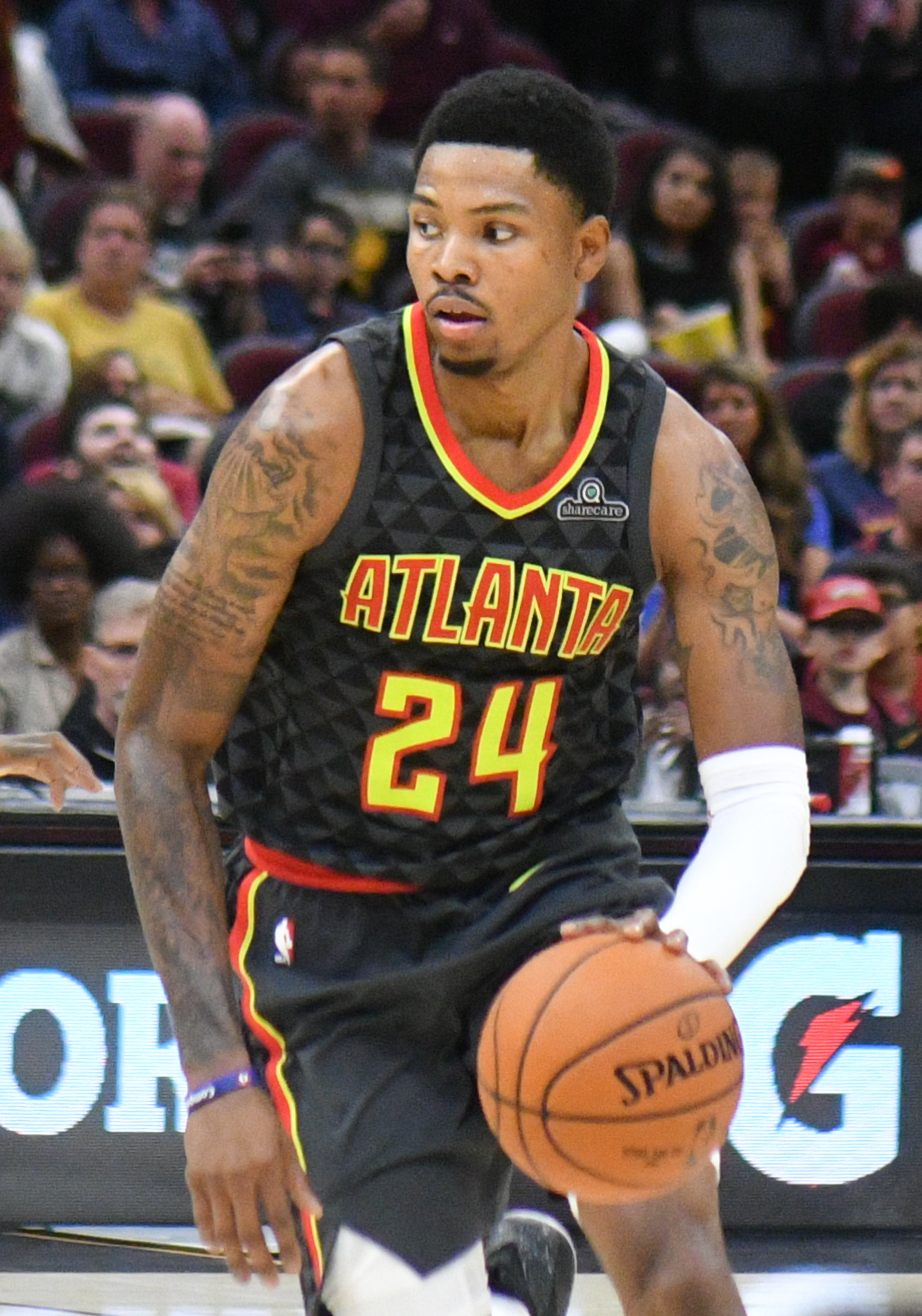 Cleveland Cavaliers vs. Atlanta Hawks